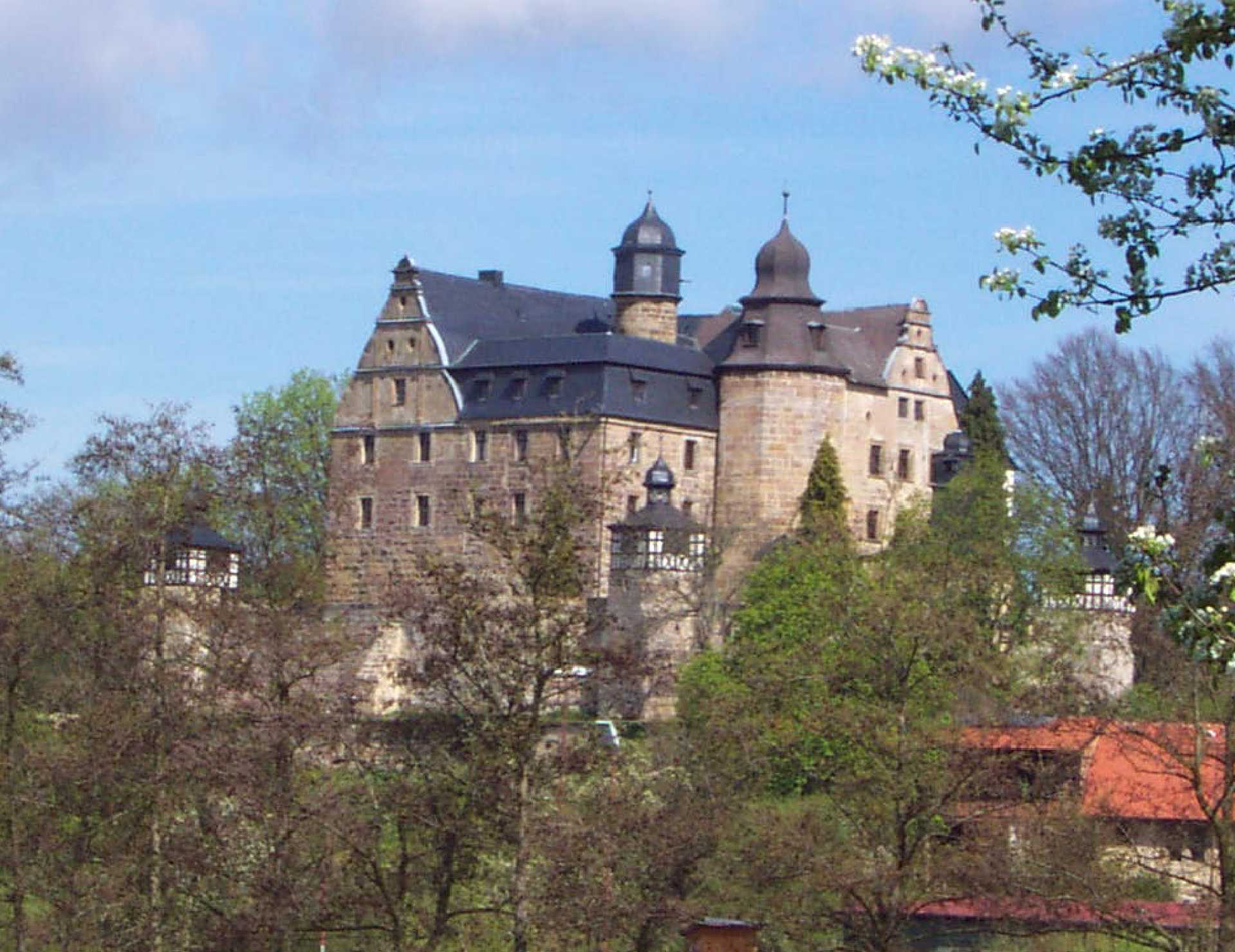 Burg Wernstein bei Mainleus